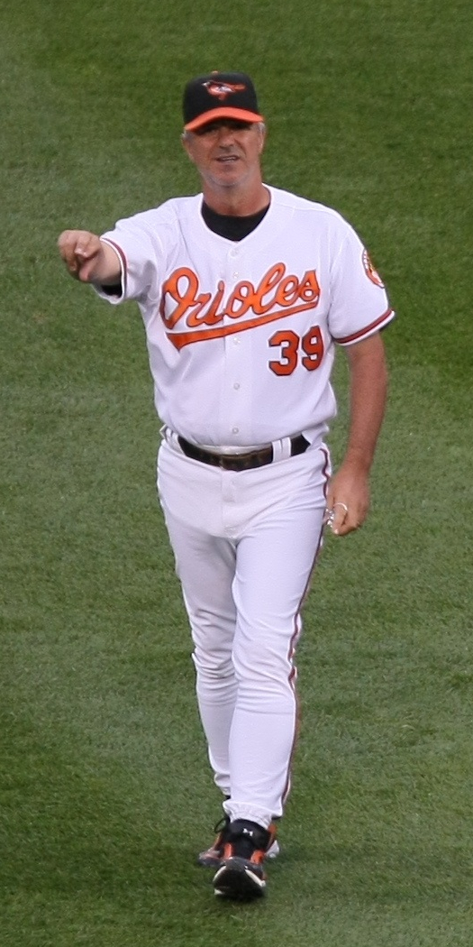 Rick Kranitz